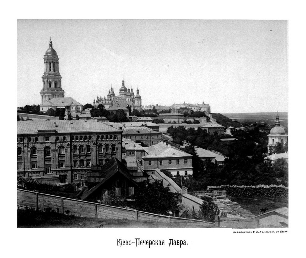 Києво-Печерська лавра Київ (Kiev Pechersk Lavra) 1888